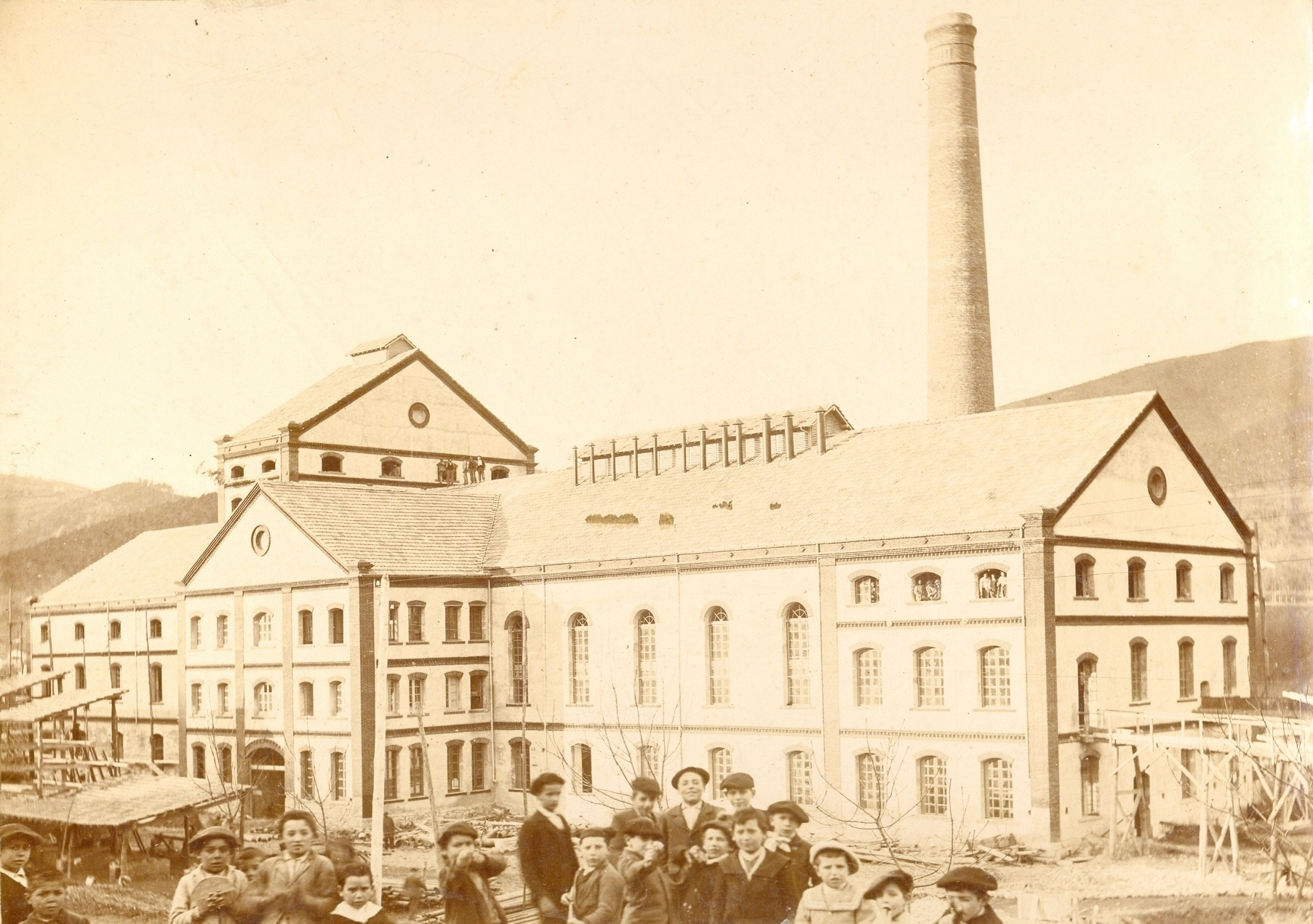 Imagen de la Azucarera de Pravia, Asturias, tomada el día de la inauguración de la fábrica, en el año 1900.